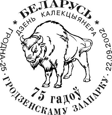 Памятный спецштемпель, который использовался 22 сентября 2002 года во время проведения дня коллекционера в городе Гродно, посвящённого 75-летию со дня основания Гродненского зоопарка. Художник - Алексей Бушкин.